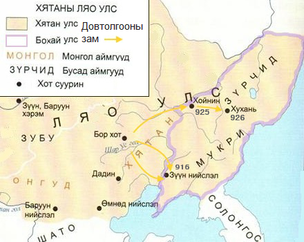 Монгол: Бохай улсын Киданы хавсралт